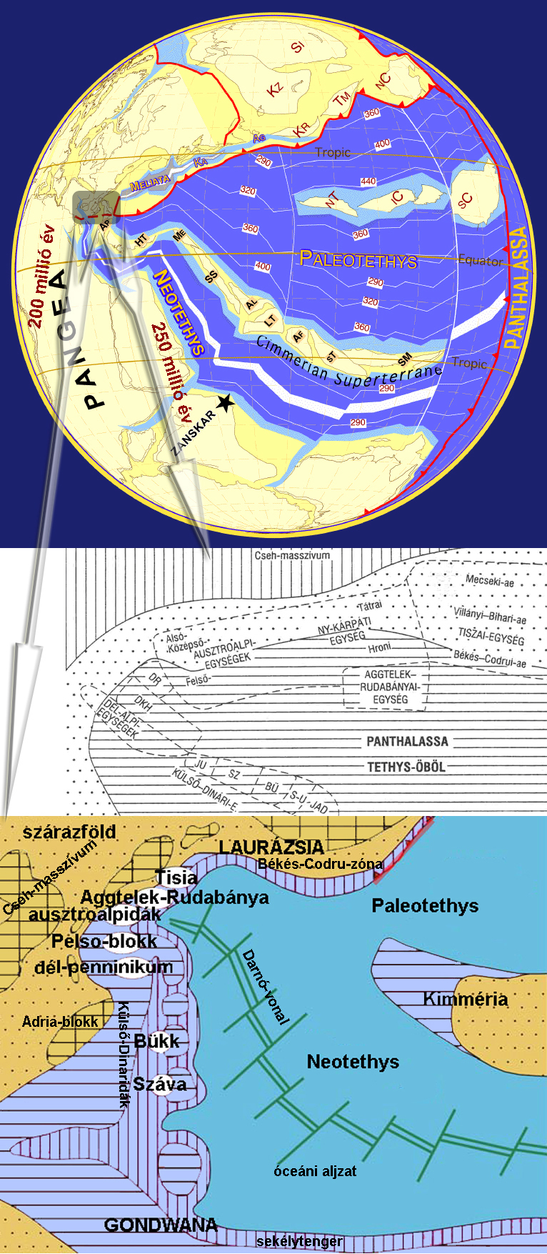 A Föld térképe 250 millió éve, a Kárpát-medence kialakulása 250–200 millió éve